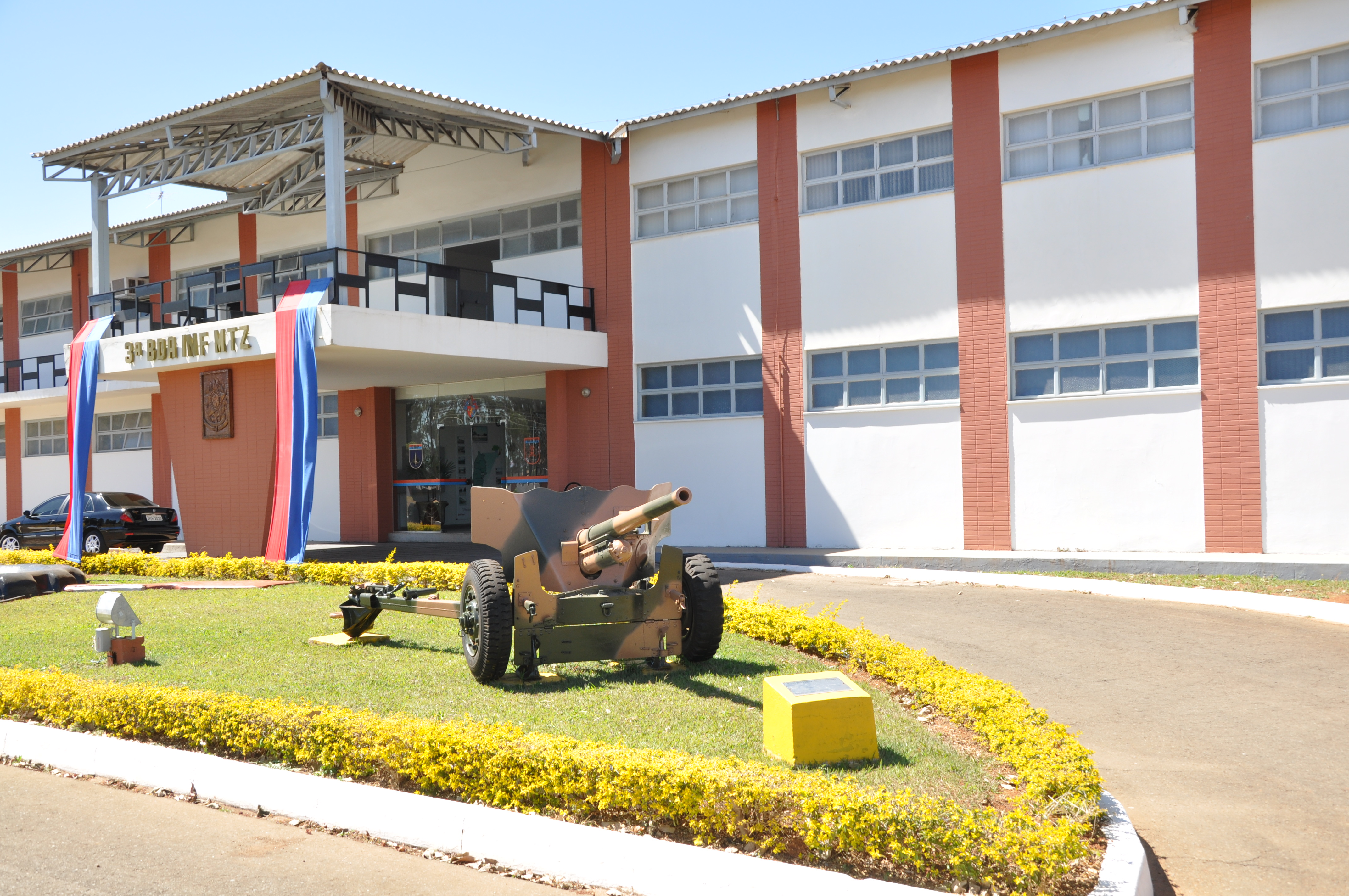 3ª Brigada de Infantaria Motorizada do Exército, pavilhão principal em Cristalina - Goiás.